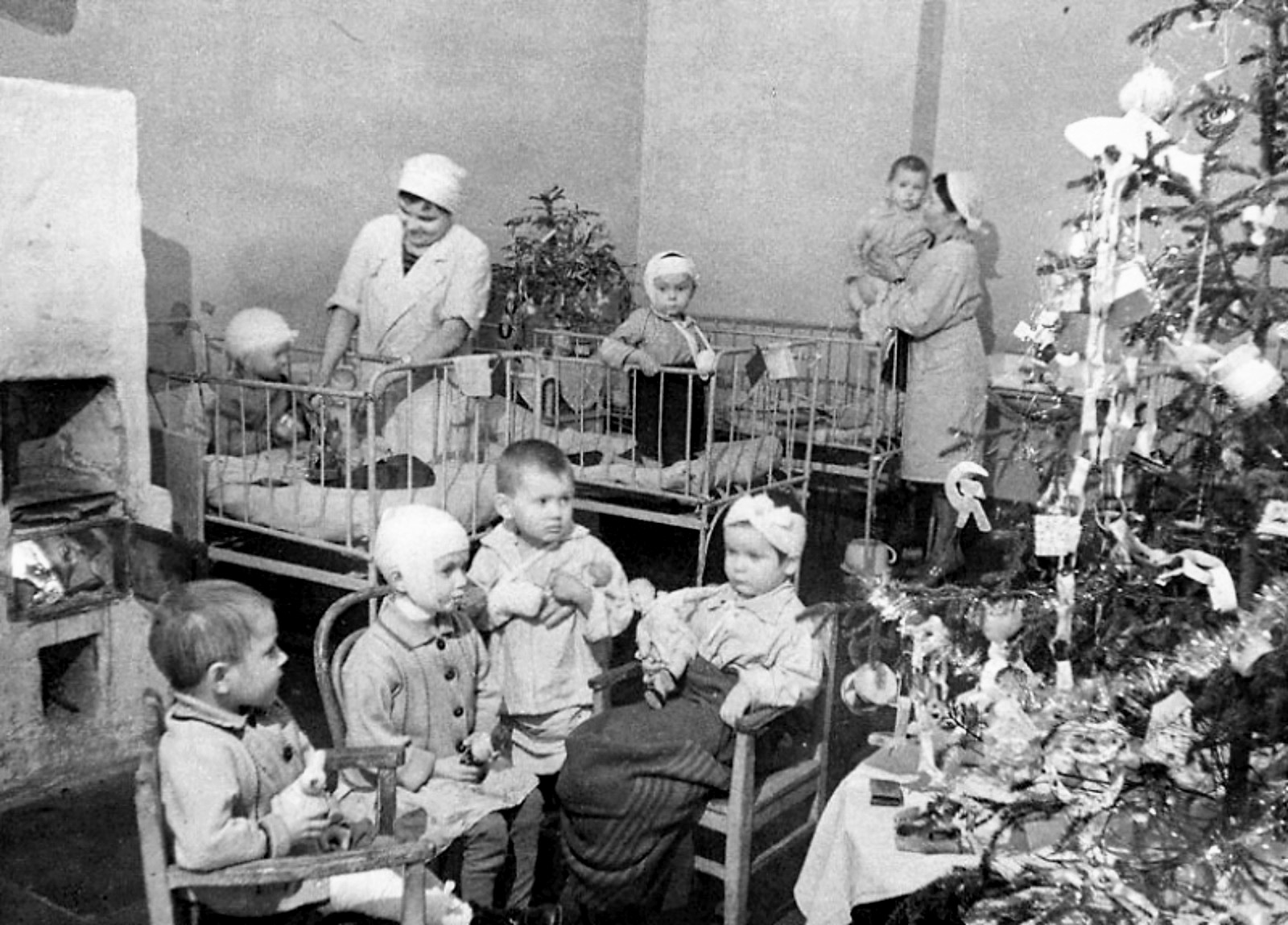 Новогодняя елка в хирургическом отделении Городской детской больницы имени доктора Раухфуса